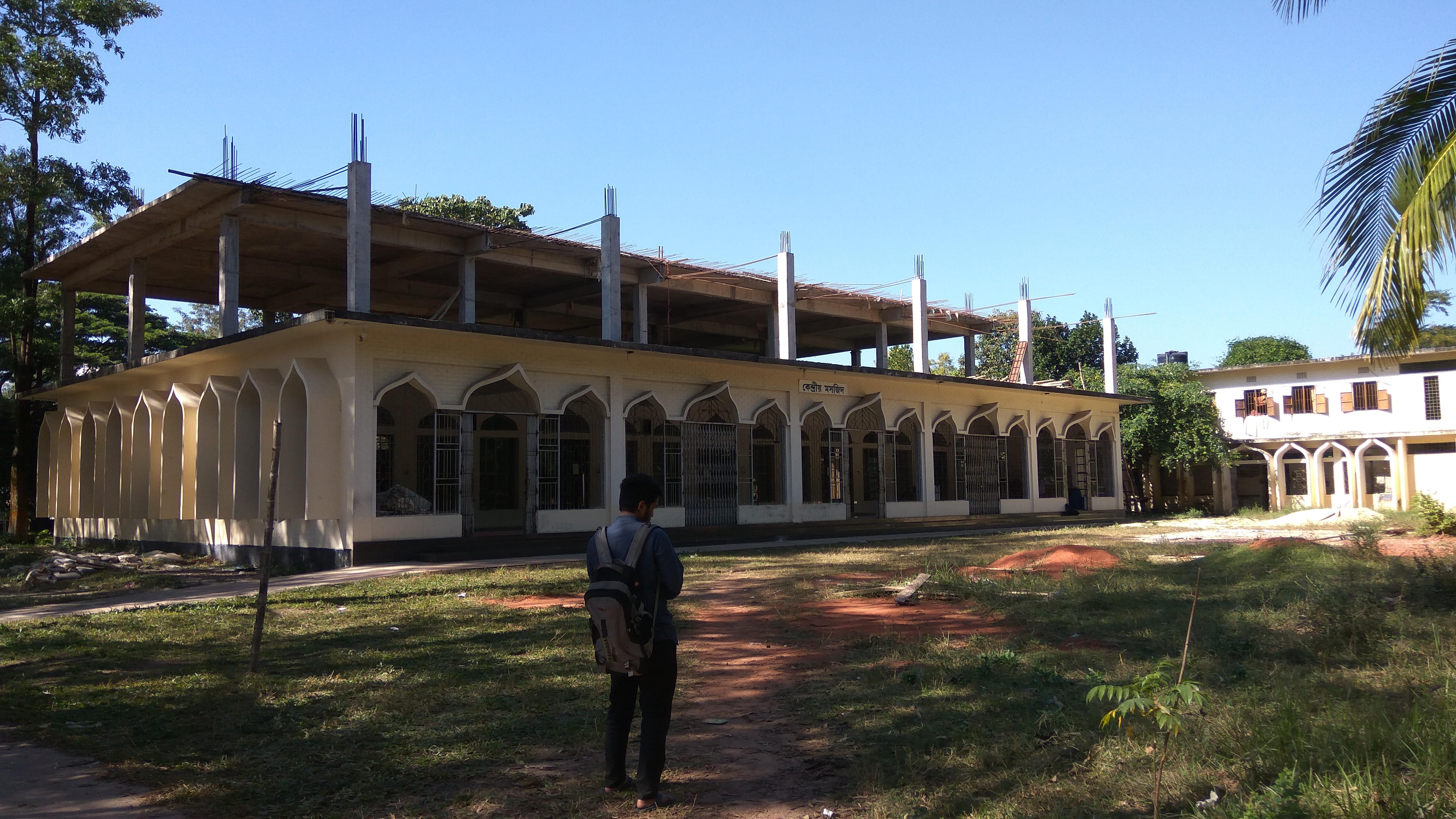 চুয়েট কেন্দ্রীয় মসজিদ